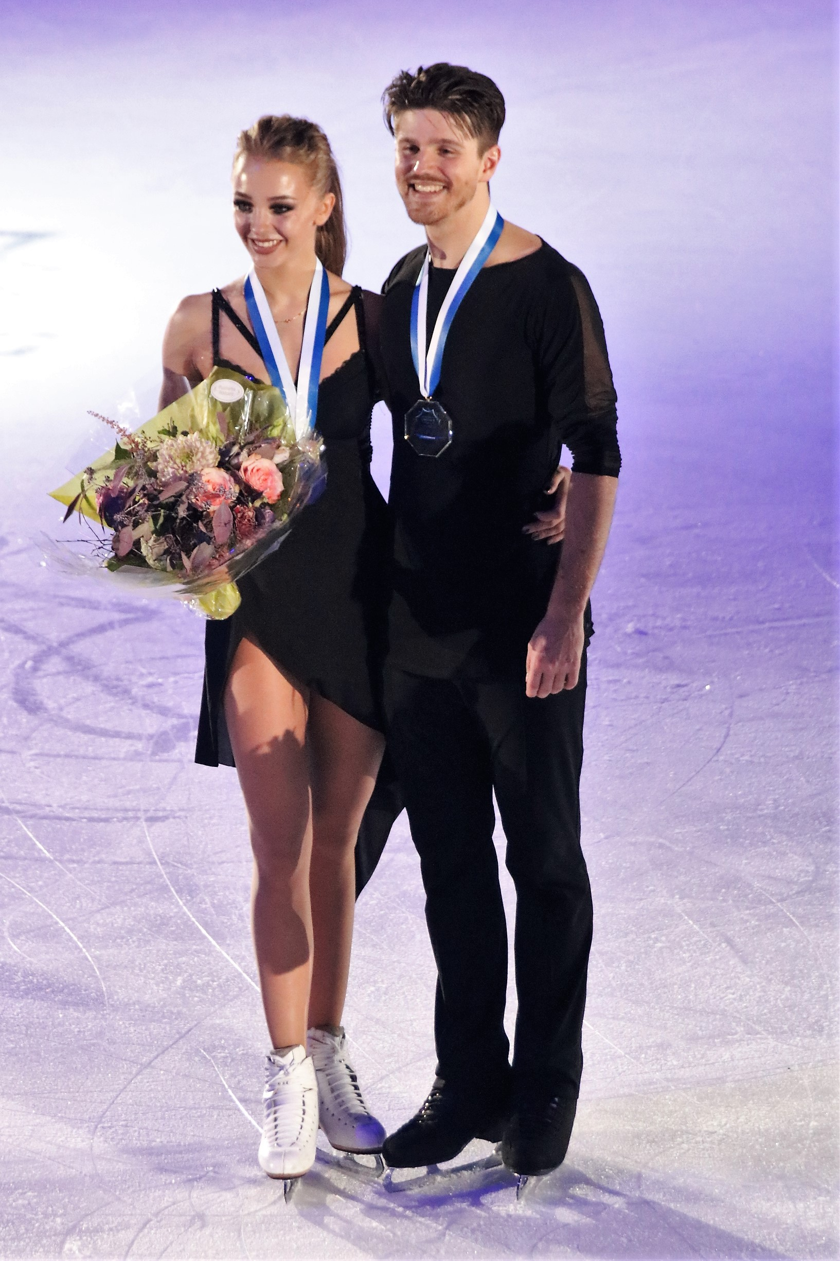 Александра Степанова / Иван Букин (Россия) на церемонии награждения Гран-при Хельсинки 2018. Золото.